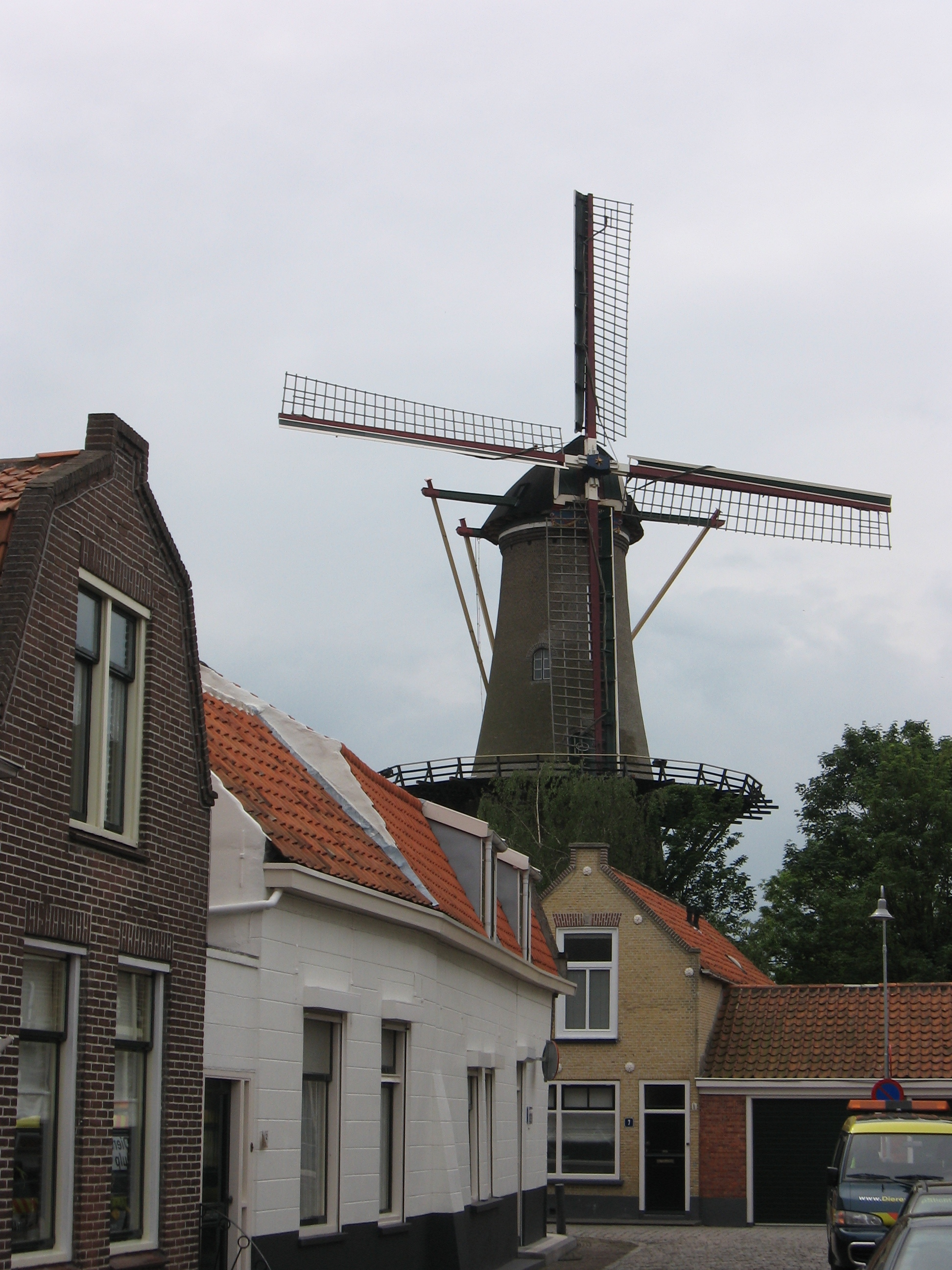 De Hoop, Zierikzee